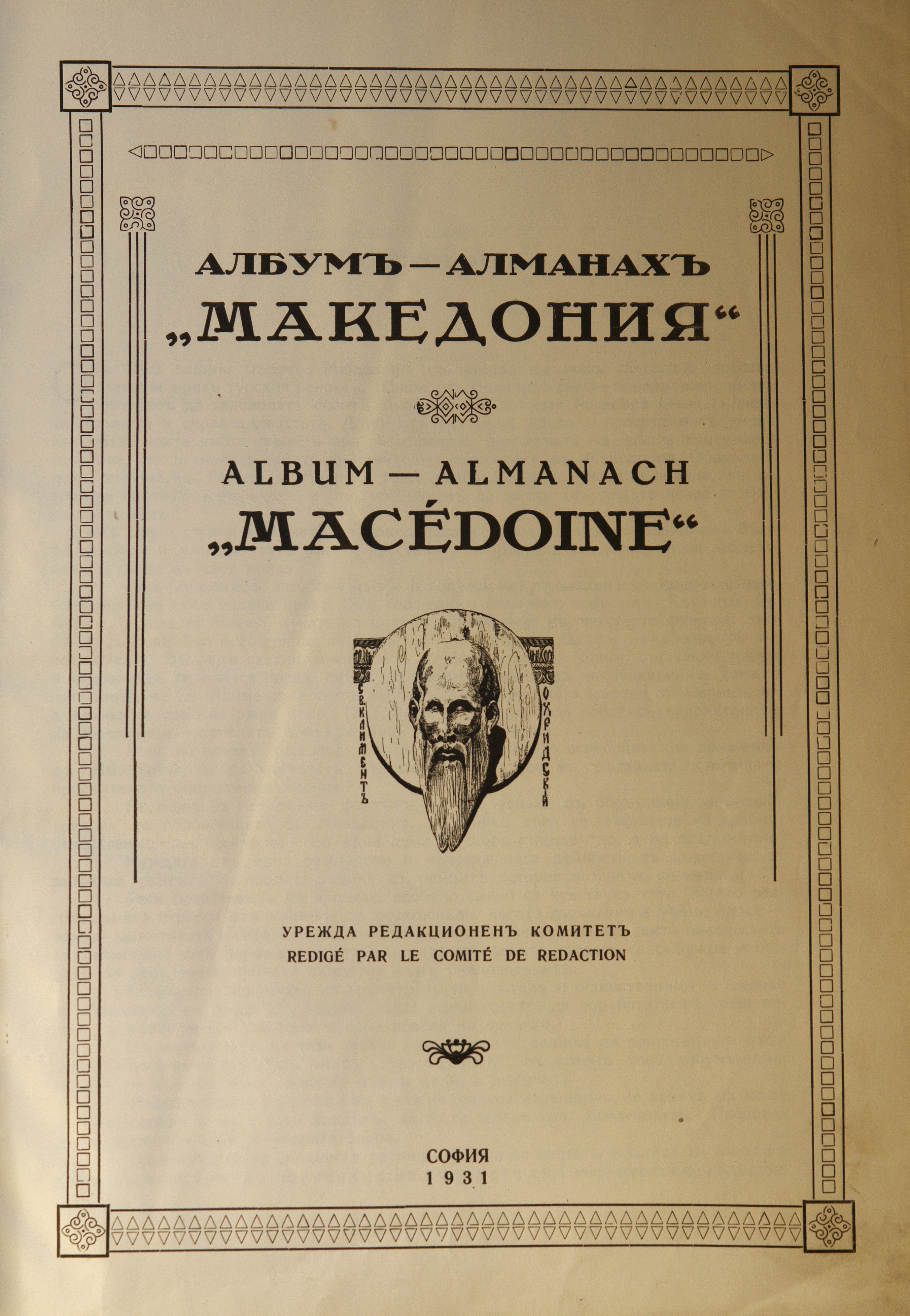 Заглавна страница на Албум-алманах „Македония“.